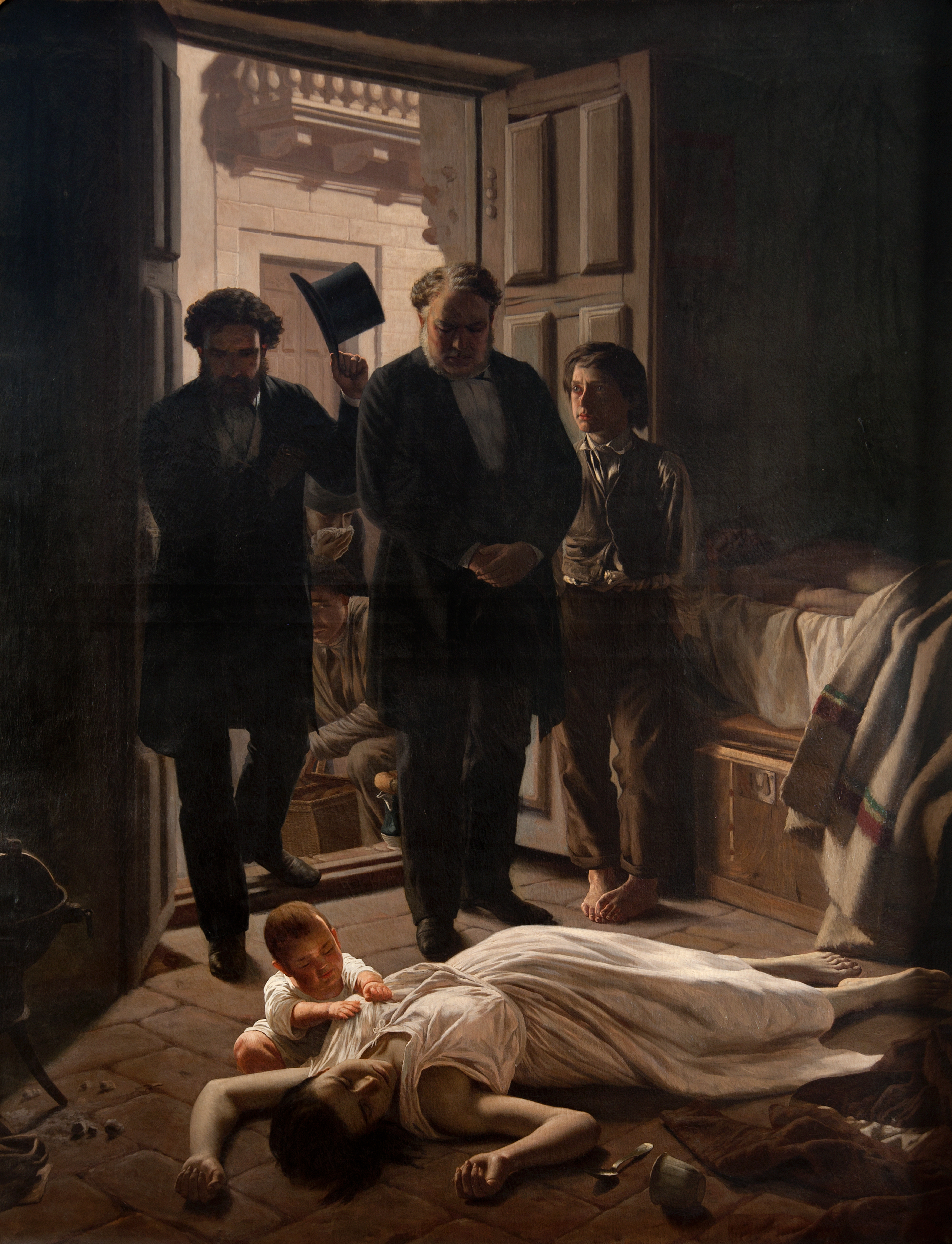 Obra "Un episodio de la fiebre amarilla en Buenos Aires" del pintor uruguayo Juan Manuel Blanes. Óleo sobre tela de 230 cm. de alto x 180 cm. de ancho. Fotografía de la obra tomada por Eduardo Baldizan.